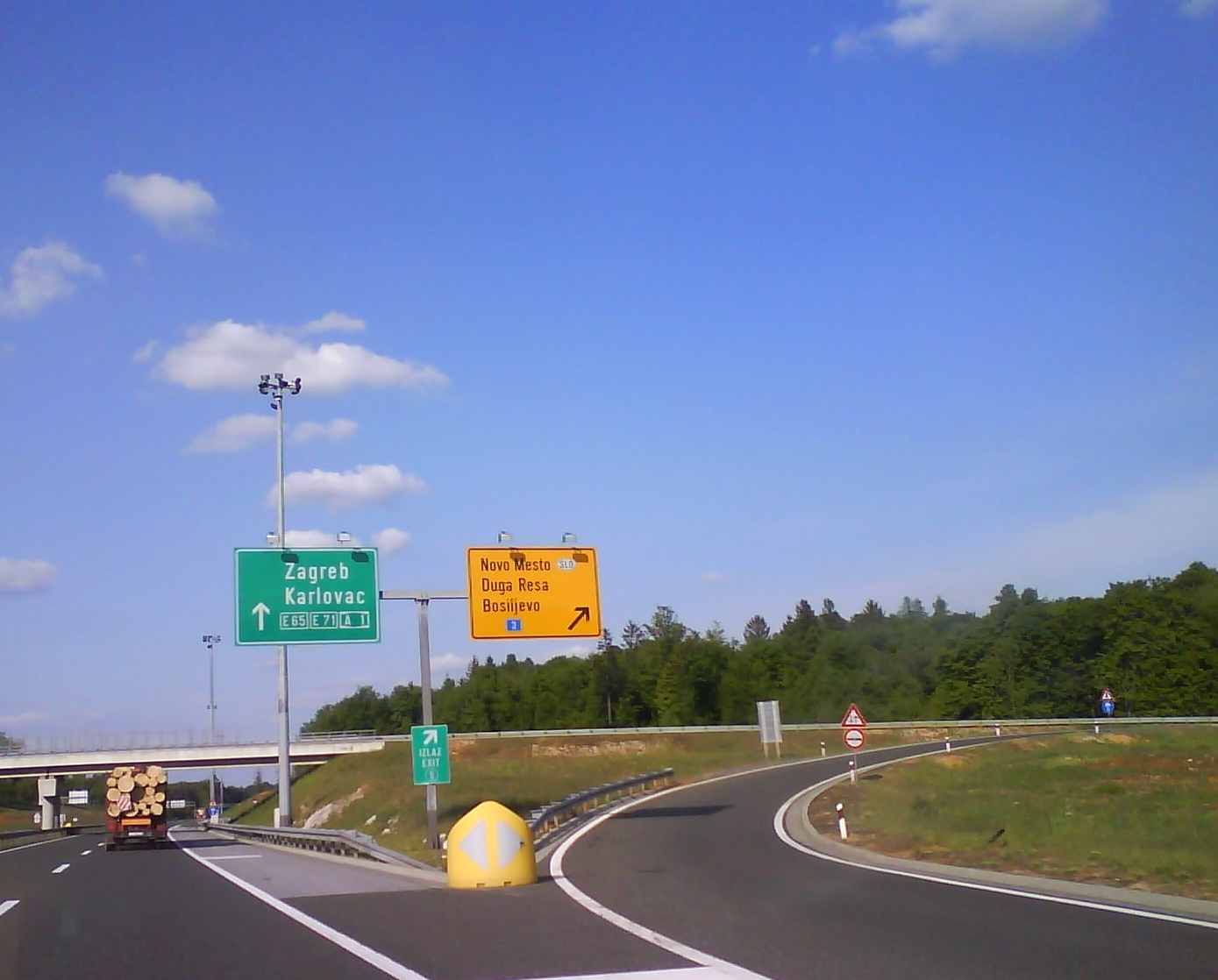 Čvor Bosiljevo I